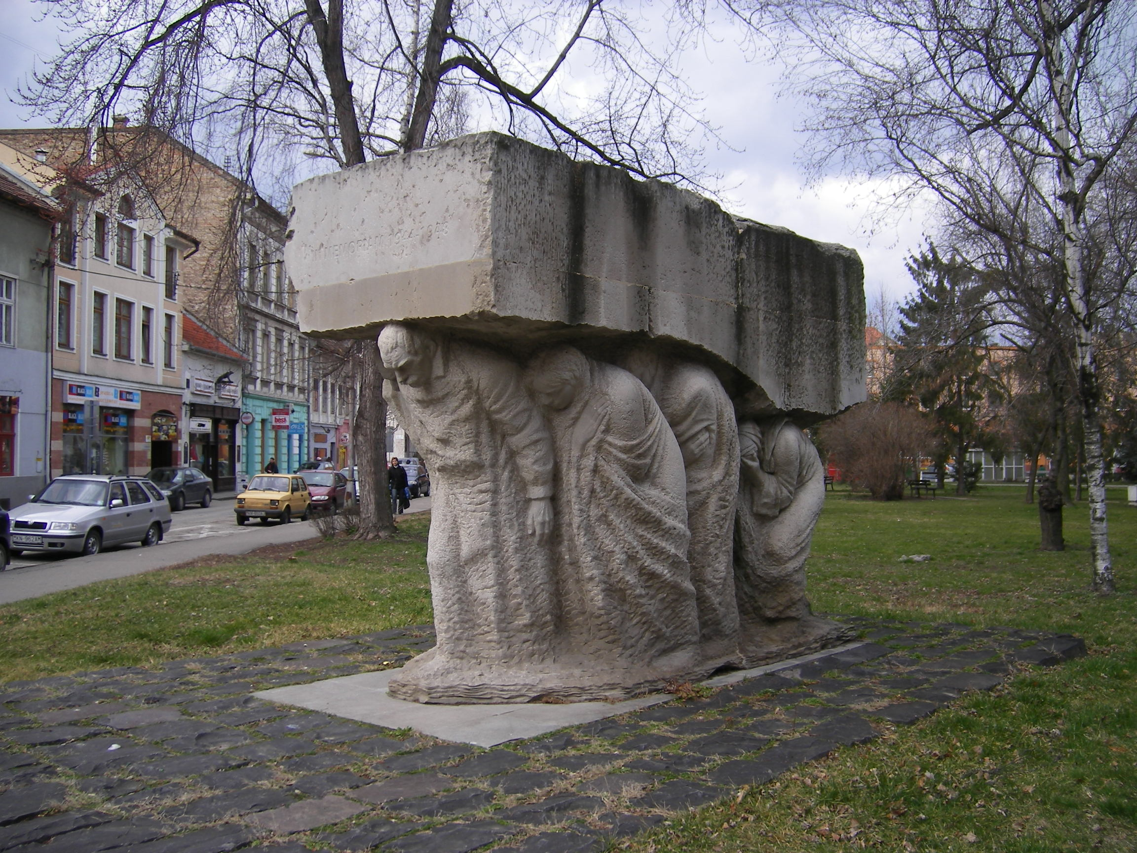 Komárom - A meghurcoltak emlékműve a Vármegye utcában